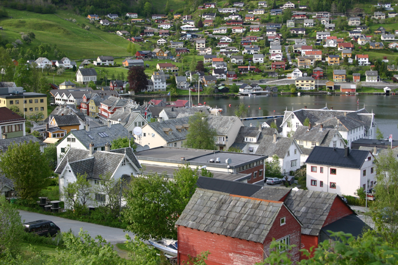 Norheimsund - Grova